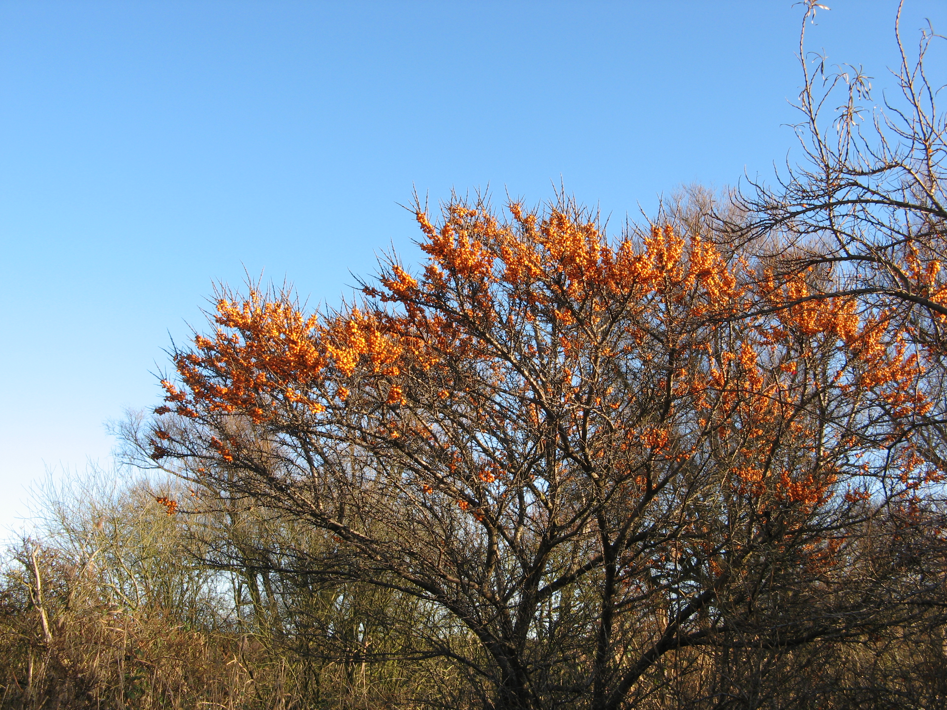 Sanddorn-Busch auf dem Priwall